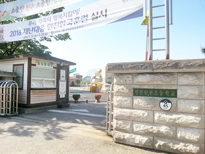 인천송현초등학교 교문. 인천 동구 송화로 45